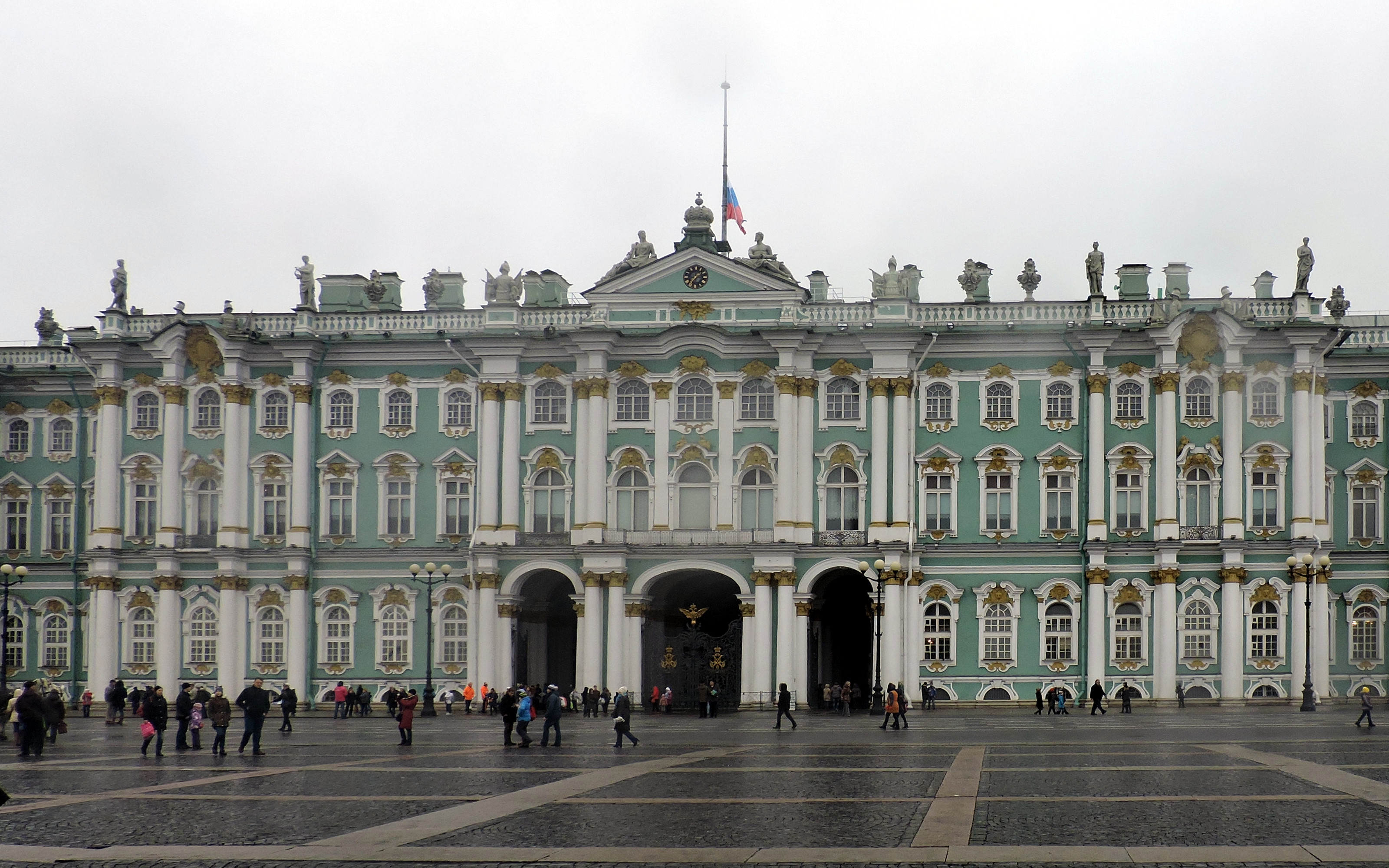 Зимний дворец 4.11.15. Из-за траура по погибшим в авиакатастрофе рейса 9268 приспущен государственный флаг России